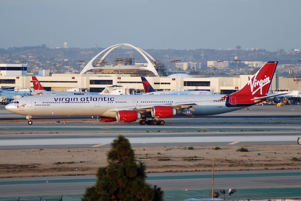 G-VMEG